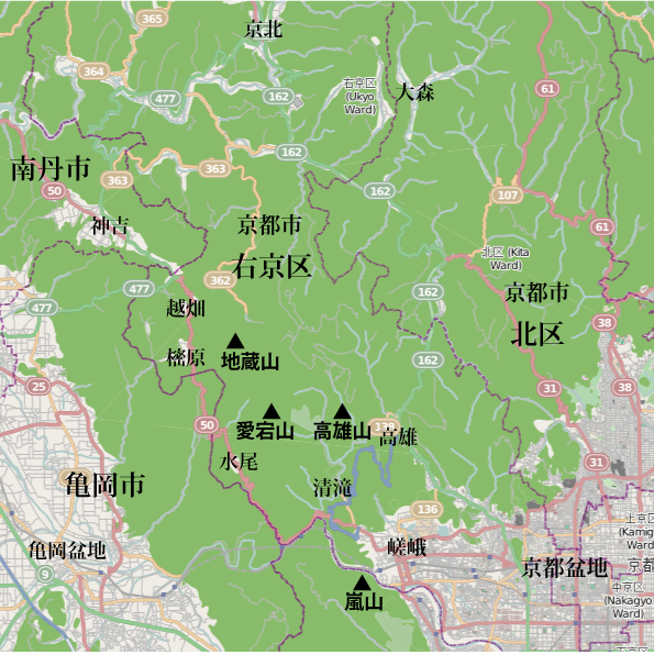 京都北山 西部の地図 This map may be incomplete, and may contain errors. Don't rely solely on it for navigation.